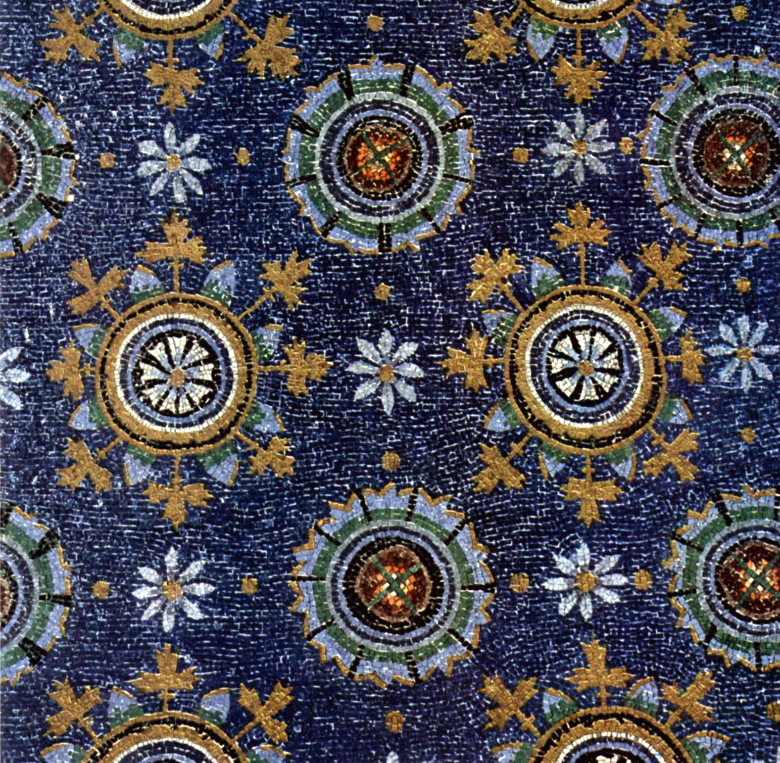 Decoração floral no Mausoléu de Gala Placídia